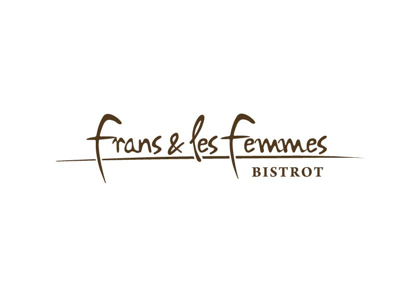 Logo